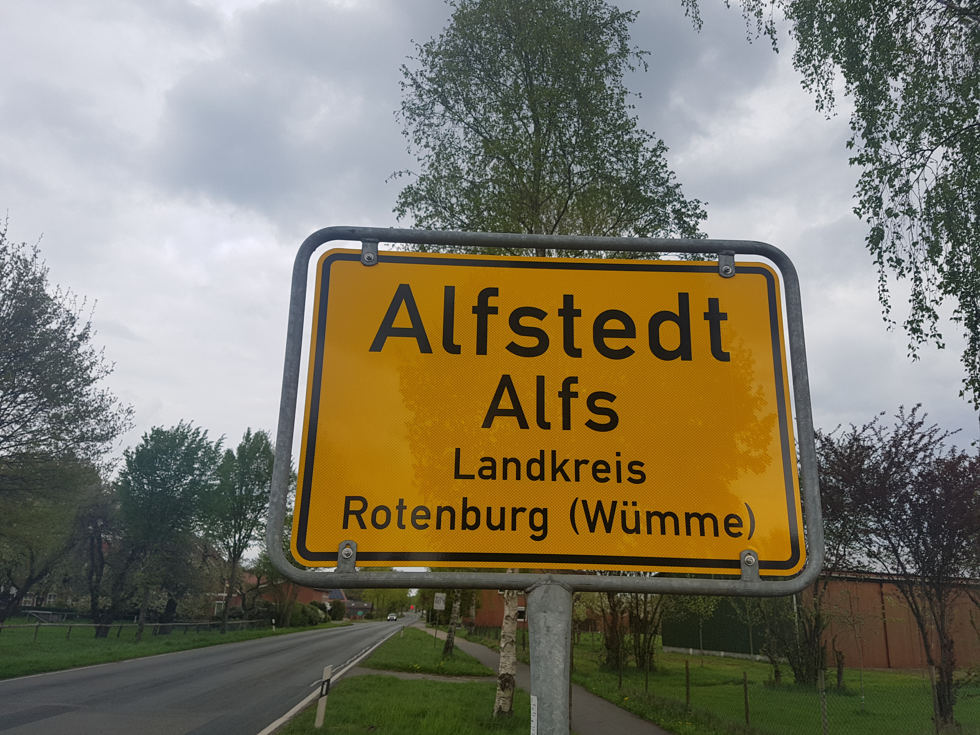 Oortsschild von Alfs an de B 495, Oortsingang in’n Süden